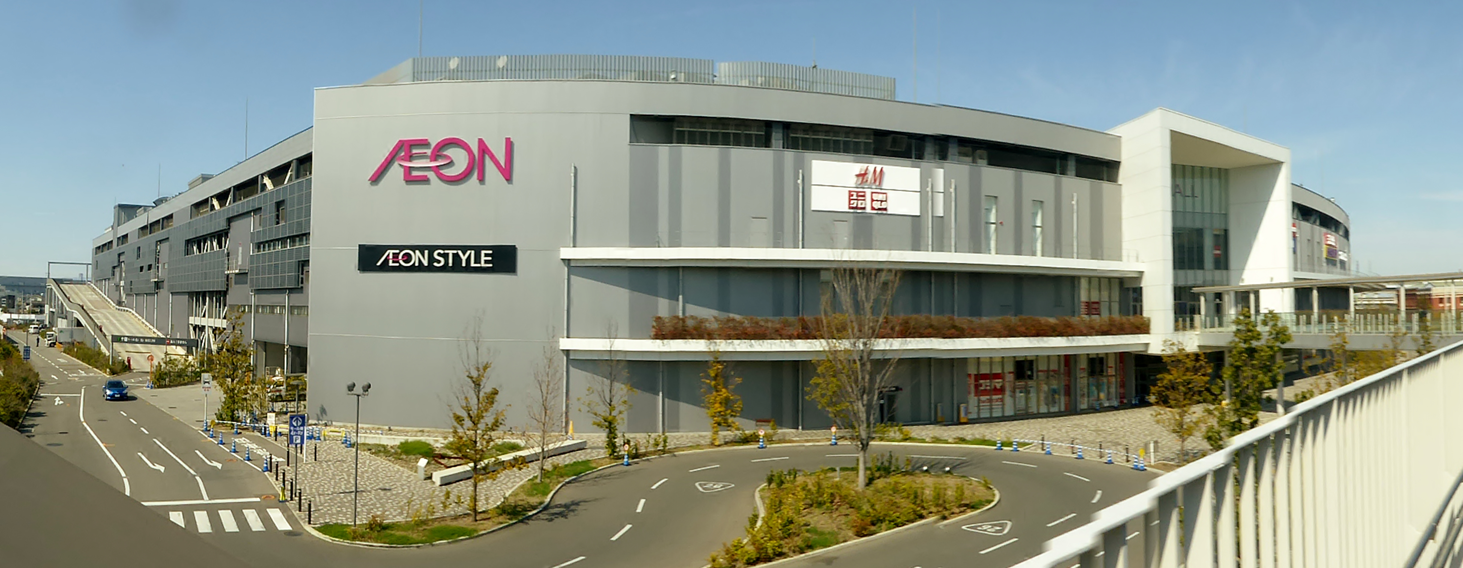 イオンモール堺鉄砲町を撮影。 Panasonic Lumix DMC-TZ60